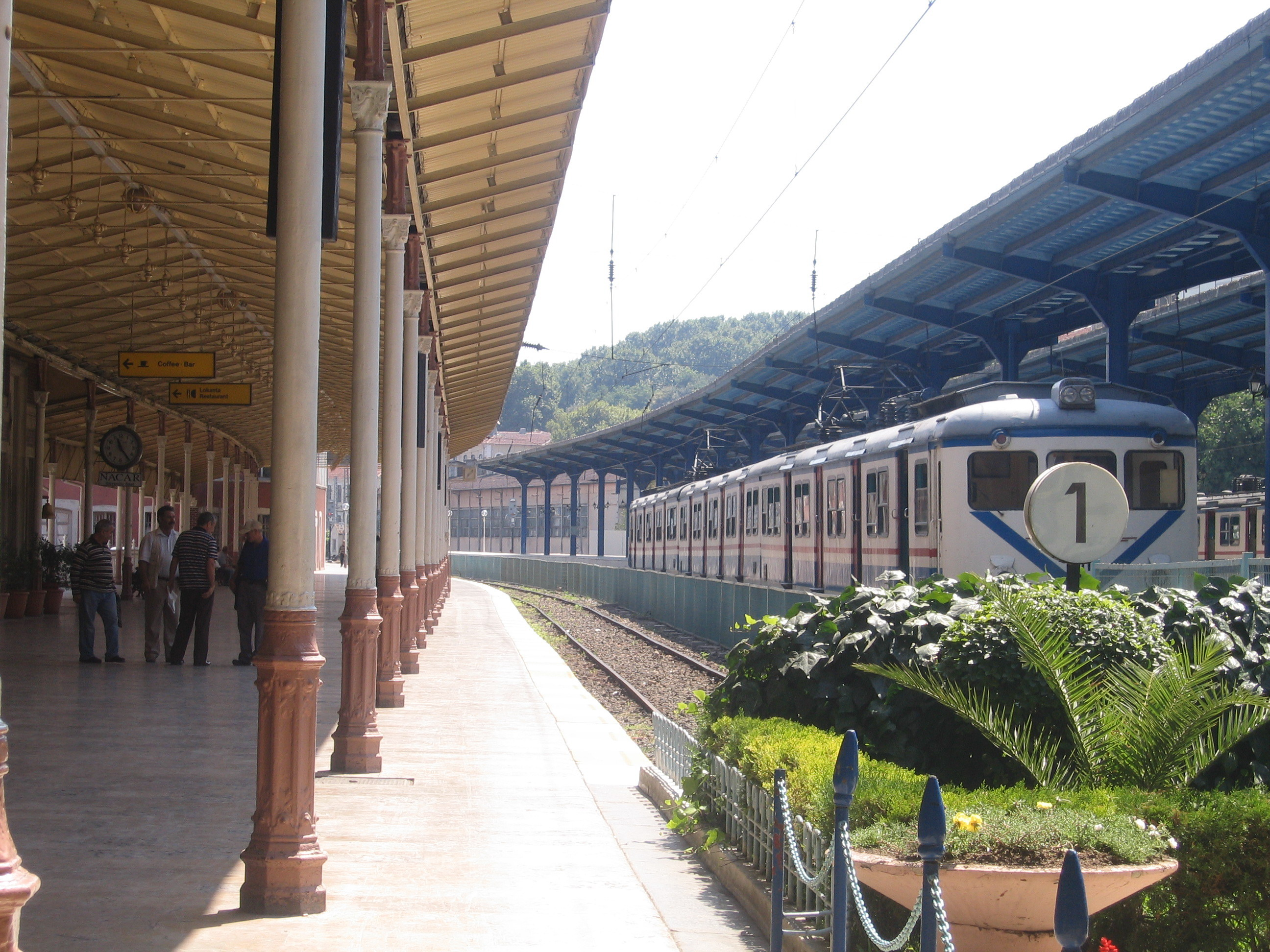 Sirkeci Train Terminal in Istanbul, Turkey